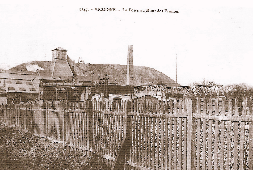 La Fosse n° 4 ou Le Bret de la Compagnie des mines de Vicoigne était un charbonnage constitué d'un seul puits situé à Raismes, Nord, Nord-Pas-de-Calais, France. 5247. VICOIGNE. La Fosse au Mont des Ermites